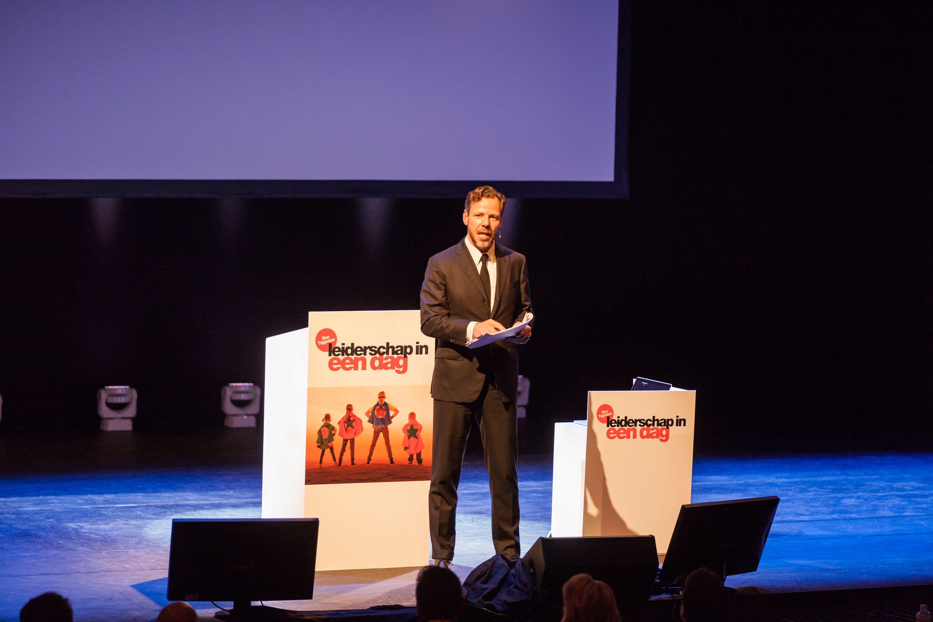 Ben Tiggelaar